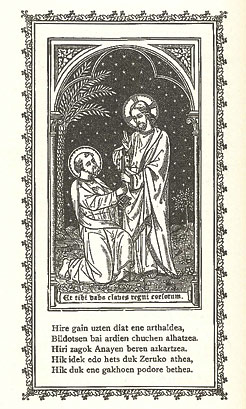 Jean Pierre Arbelbideren "Erlisionea" liburuaren orri bat